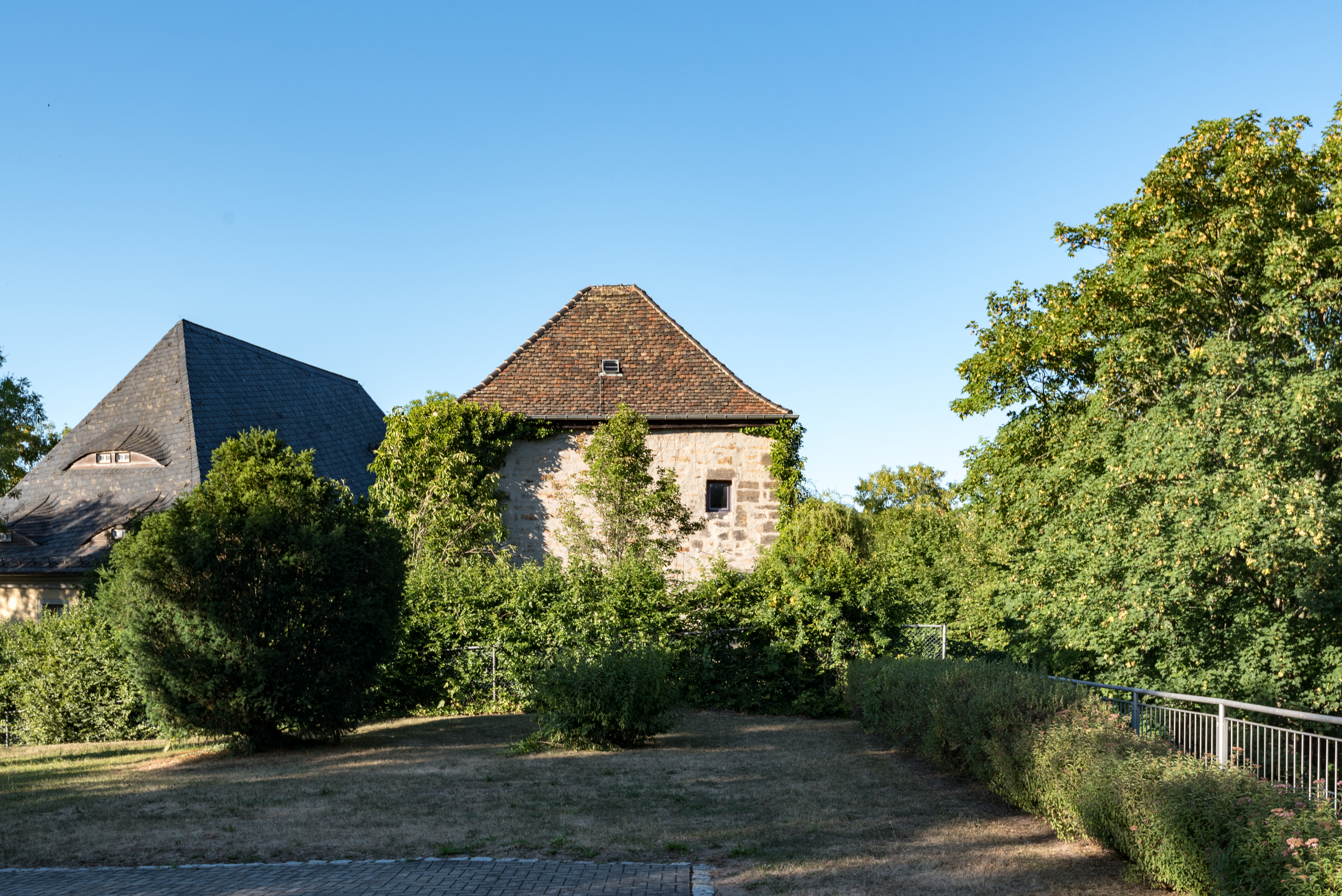 Weißenfels, Am Stadtpark, Stadtmauer